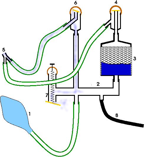 halbgeschlossenes Narkosekreissystem in Expiration